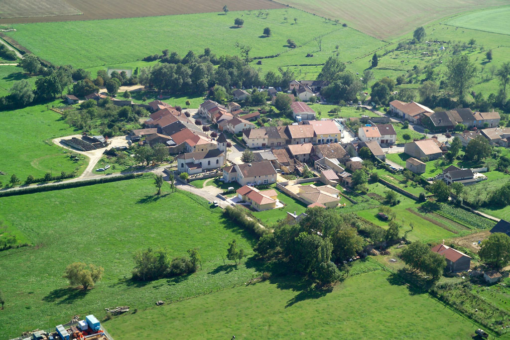 Village de Bouvron 54